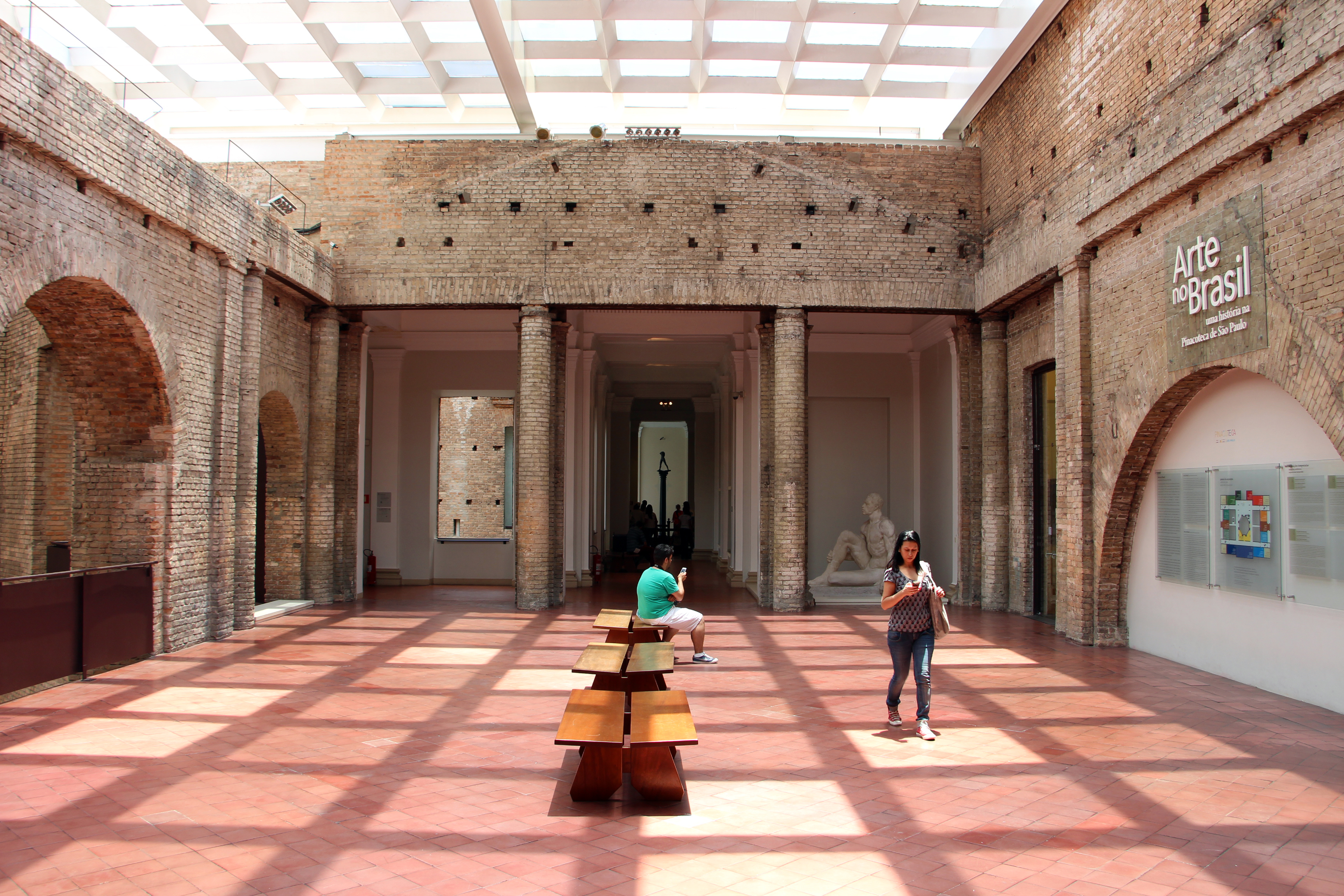 Pinacoteca Municipal de São Paulo